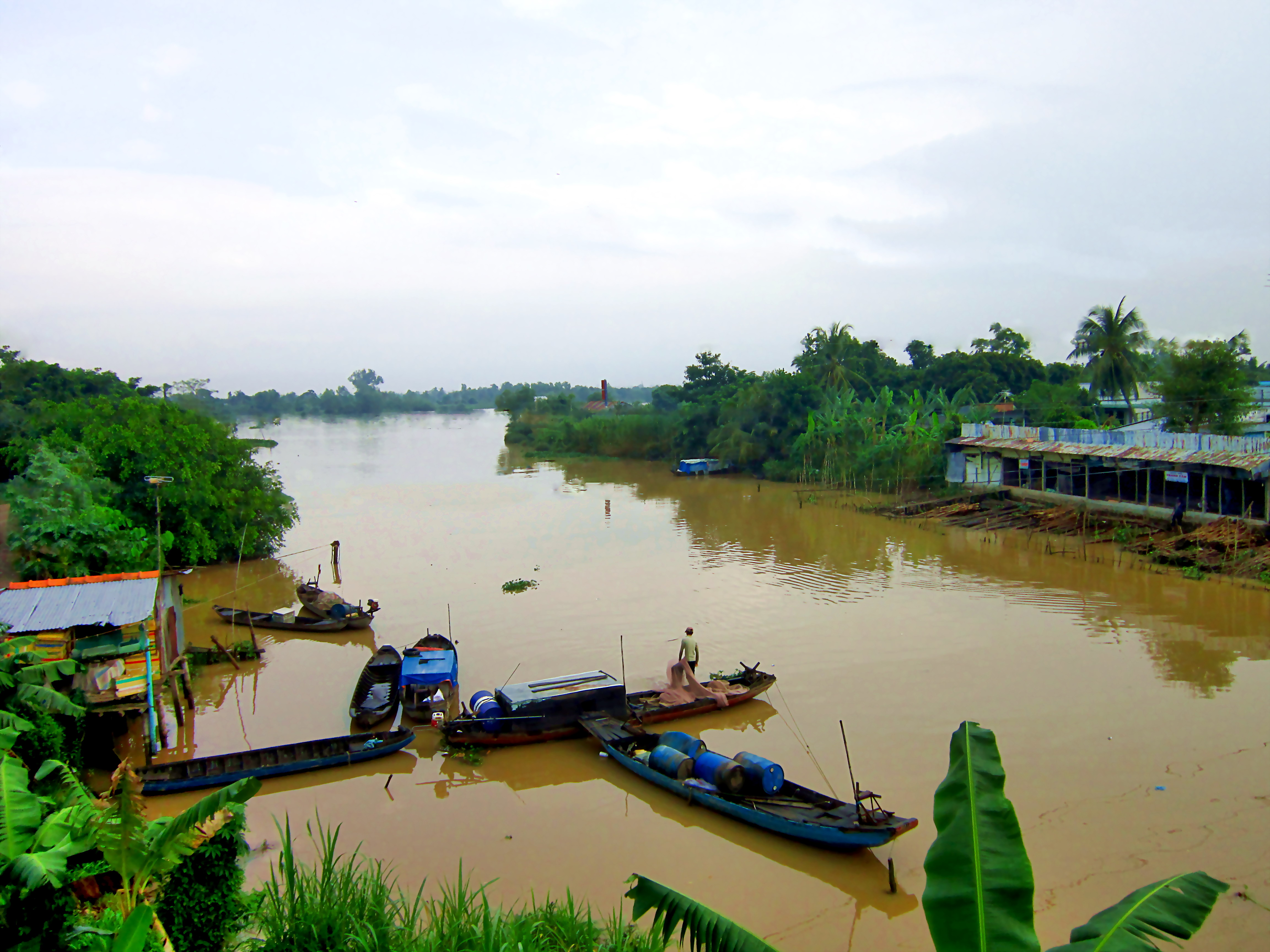 Rạch Cái Gia Lớn ở xã Tân Hội, TP Vĩnh Long, Việt Nam.